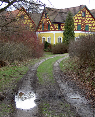 Hrázděný statek v Doubravě u Lipové, okres Cheb